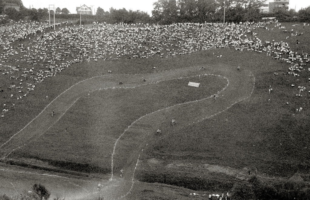 Título original: Competición de motocross en Aiete (9/12) Localización: San Sebastián (Guipúzcoa)